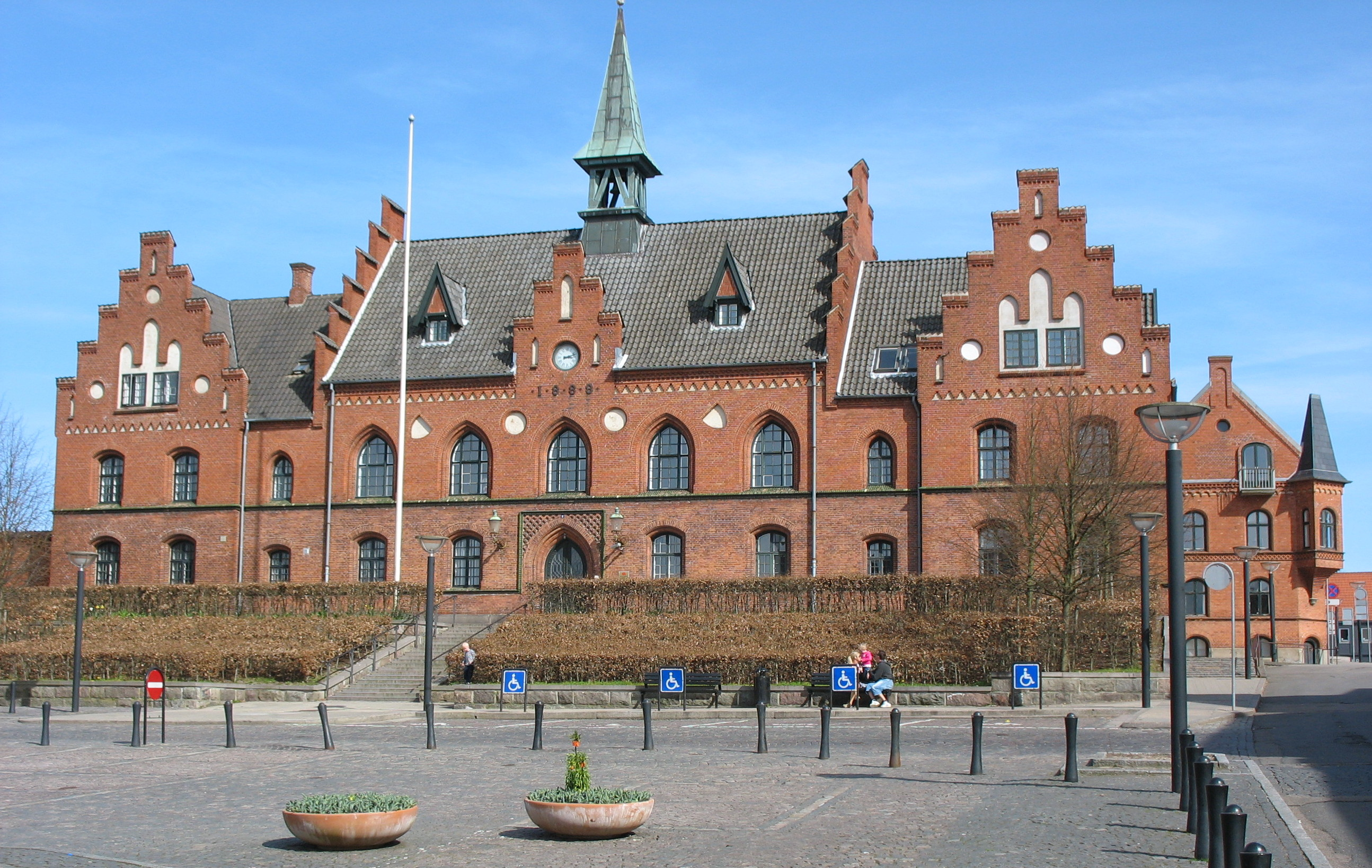 Det Gamle Rådhus i Hillerød - nu byret